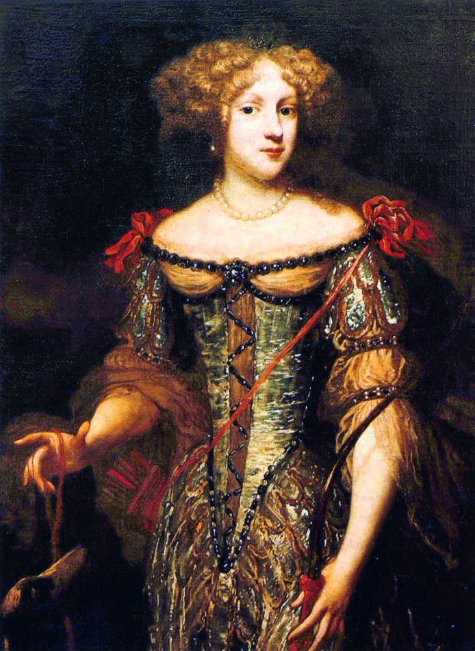 Liselotte v. der Pfalz als Diana